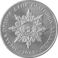 Памятная монета Республики Казахстан «Звезда ордена Данк» - 50 тенге - реверс